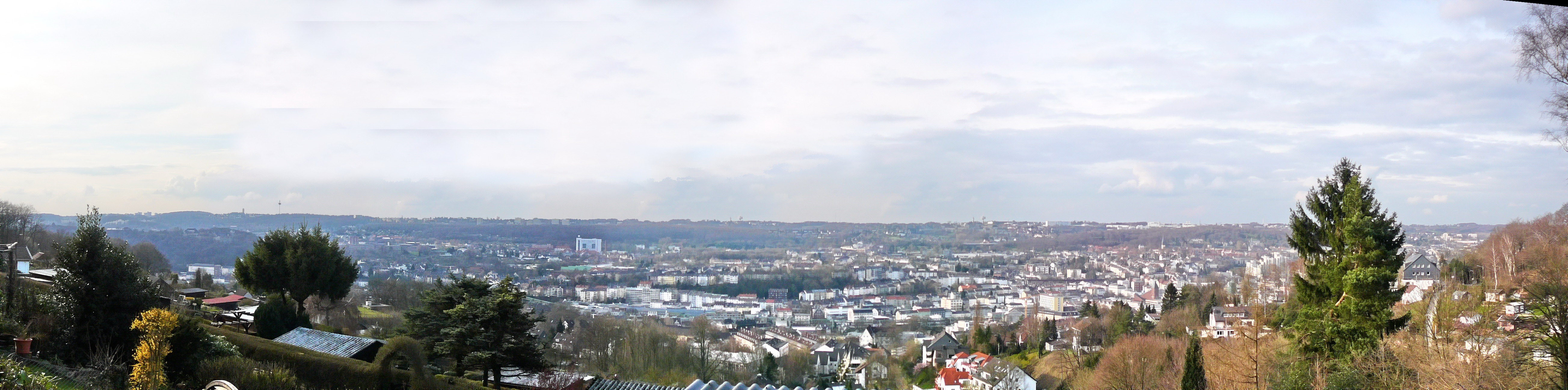 Skyline von Wuppertal-Unterbarmen, Obere Lichtenplatzer Straße